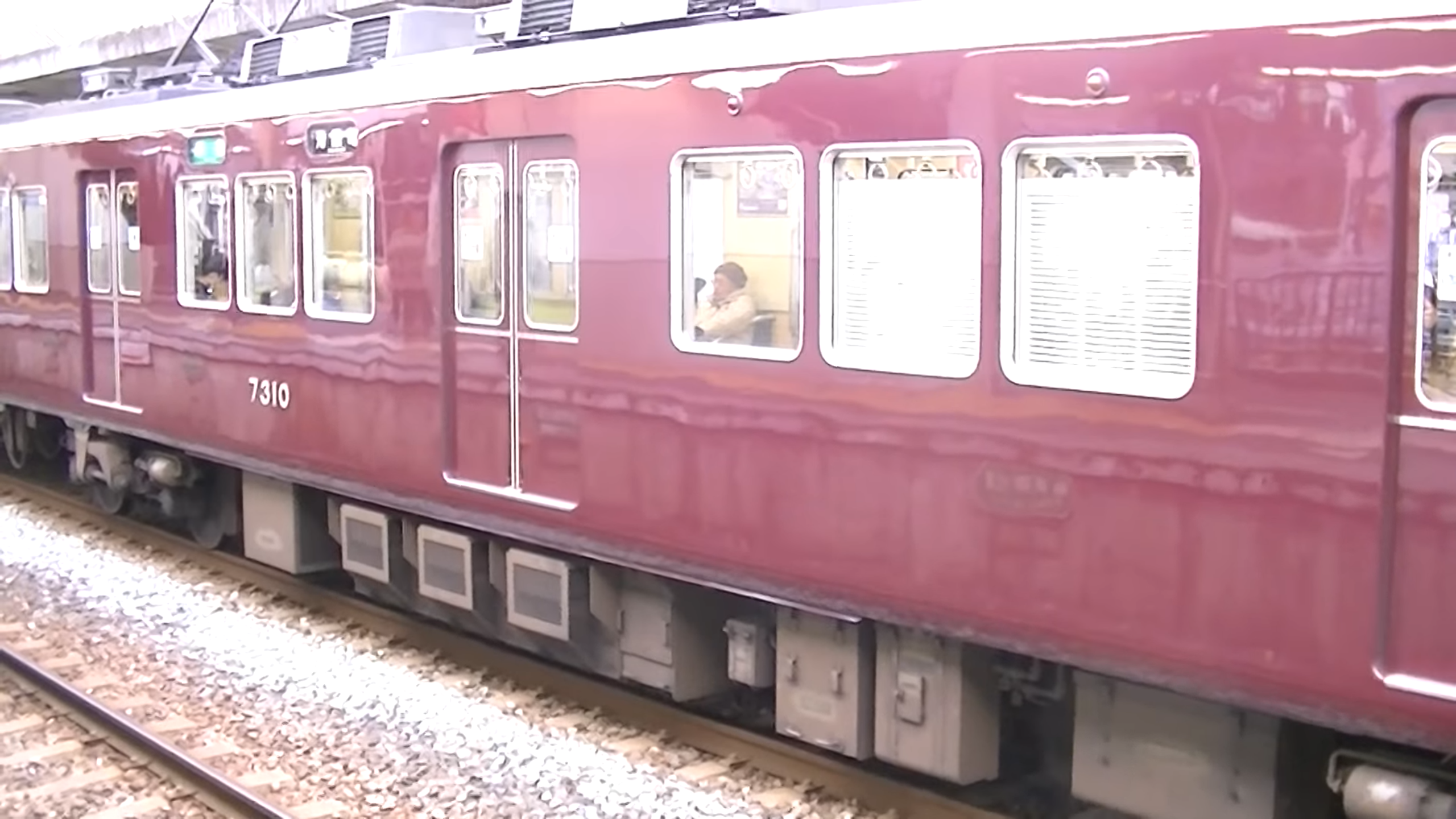 阪急7310Fに搭載されているGTO-VVVFインバータ装置